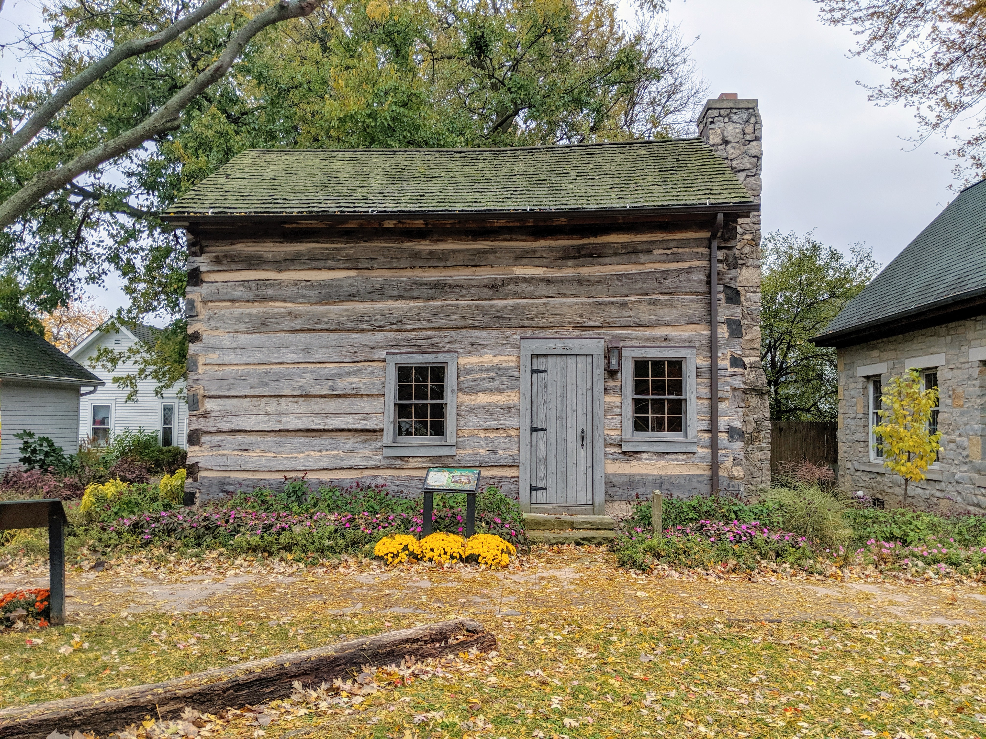 Sylvania, Ohio